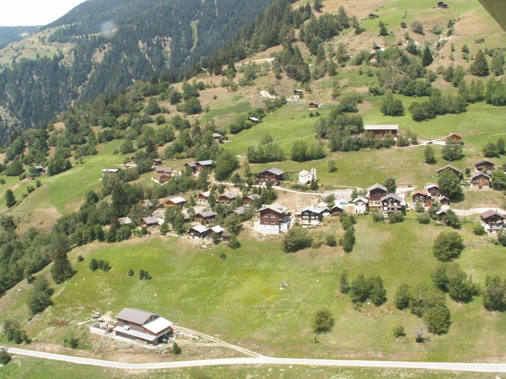 Die Gemeinde Martisberg (Kanton Wallis, Schweiz) aus der Luft.